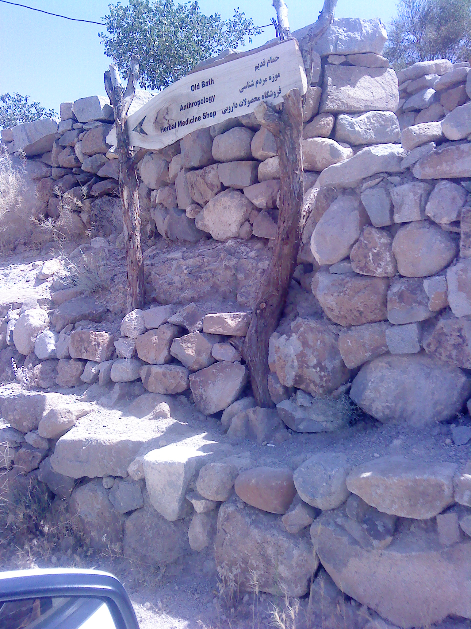 حمام میمند